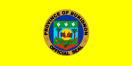 Dit materiaal is afkomstig van of en is door de auteur Jaume Ollé als GFDL beschikbaar gesteld, zie de toestemmingsemail. Hiermee vervallen de strictere voorwaarden in de disclaimers op de genoemde sites.Vrijgegeven bijdrage op Flags of the World van Jaume Olle. Zie deze verklaring op de Spaanstalige Wikipedia. GNU FDL